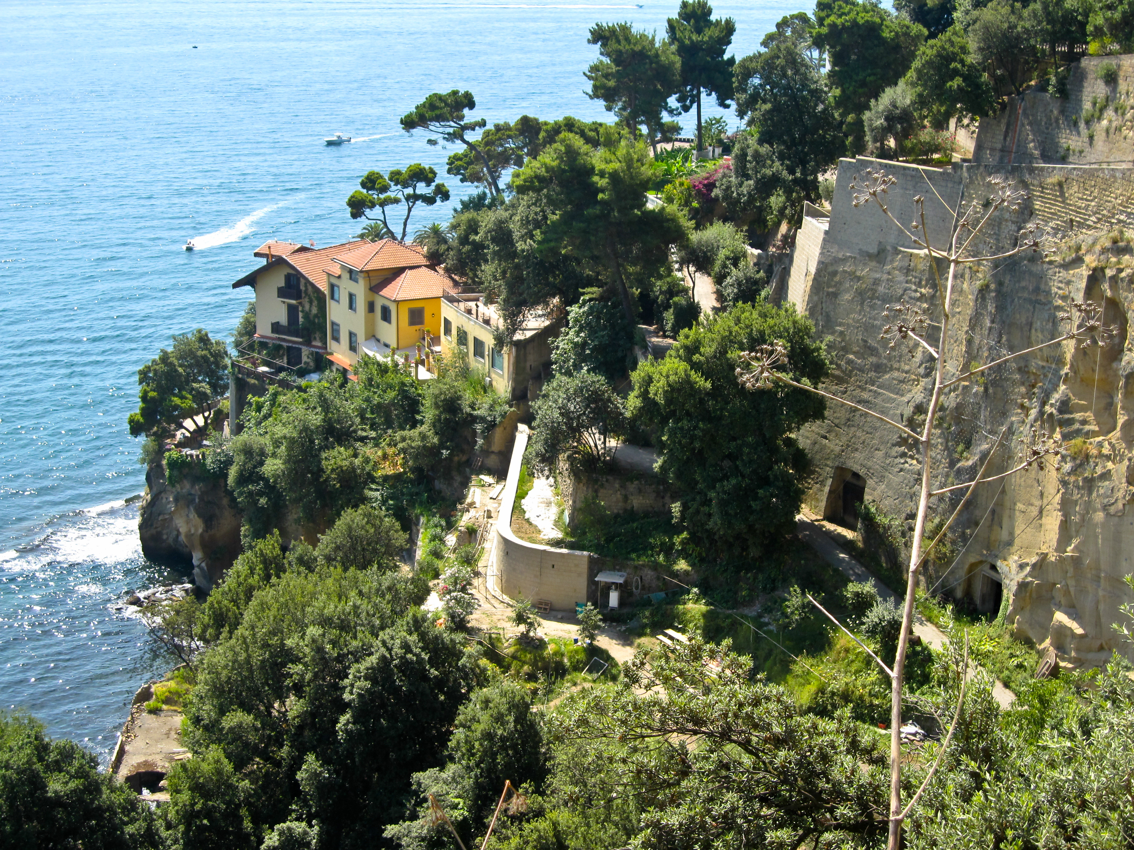 Ville sulla costa di Posillipo